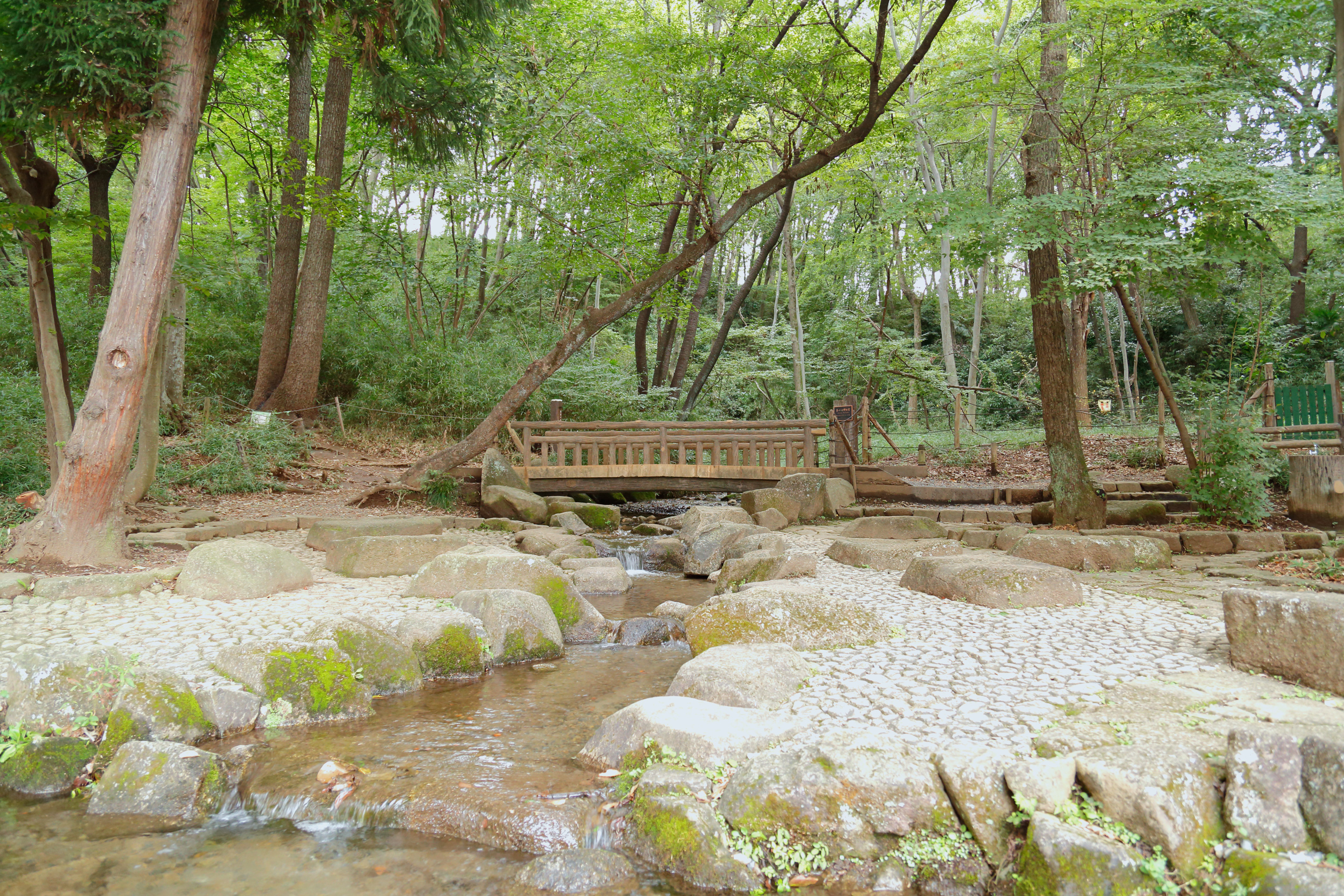 日野市の用水路#黒川清流公園の広場。